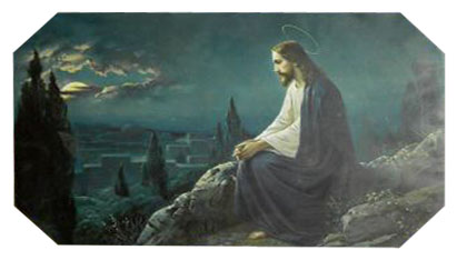 Christus am Ölbergtitle QS:P1476,de:"Christus am Ölberg" label QS:Lde,"Christus am Ölberg"